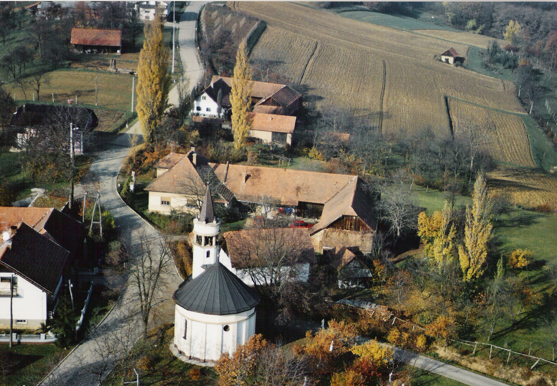 Ropoča Vrh iz zraka